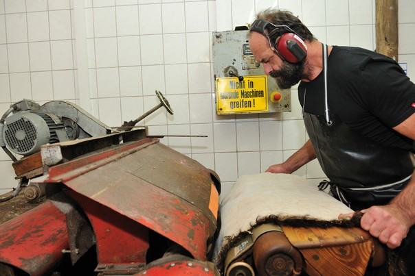 Pelzzurichtung. Eine Großviehhaut wird an der Falzmaschine dünngeschnitten. Udo Meinelt & Söhne, Rötha